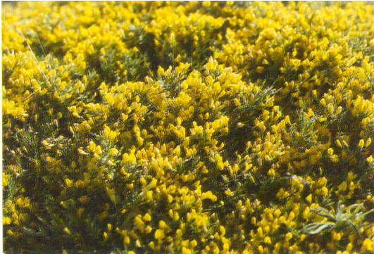 Cambrón, asiento de pastor, foto propia realizada en Torrecuadrada de los Valles.